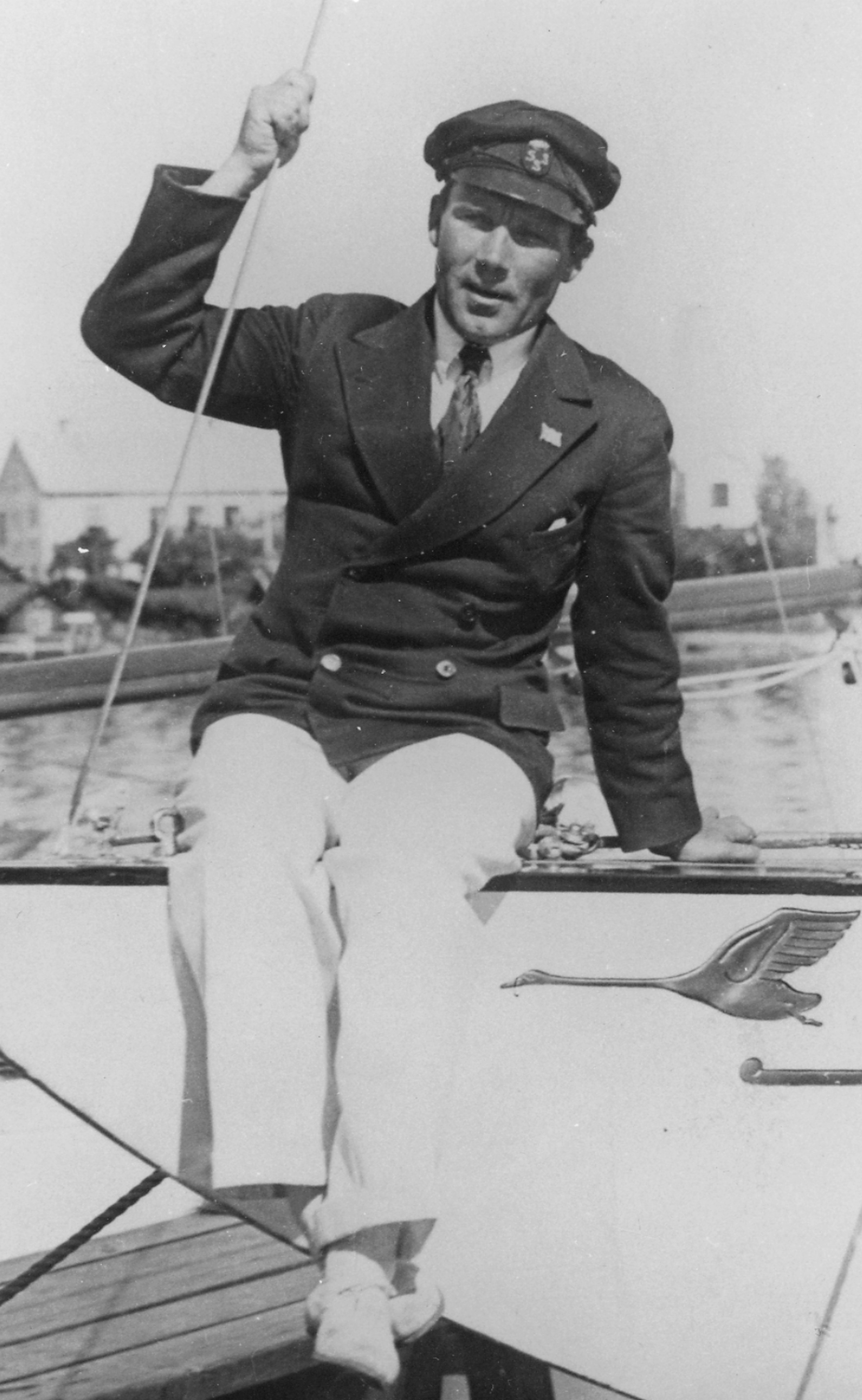 Tore Holm on Princess Svanevits, Sandhamn, Stockholm